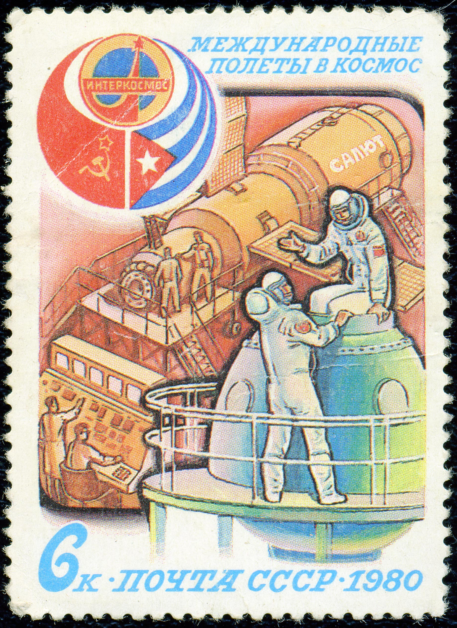 Почтовая марка СССР. 1980. Интеркосмос